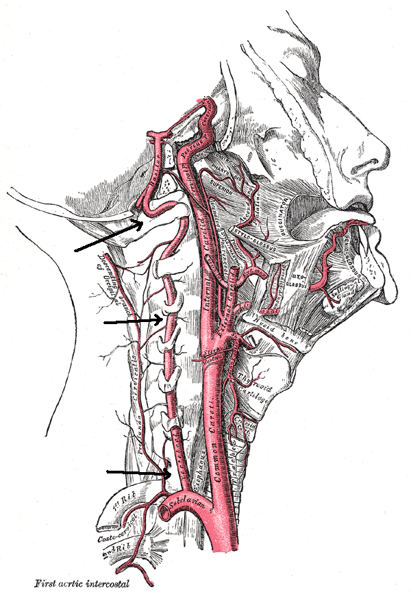 Arteriae quae cerebrum rigant: Arteria vertebralis (retro, vide sagittas) et Arteria carotis communis (ante).